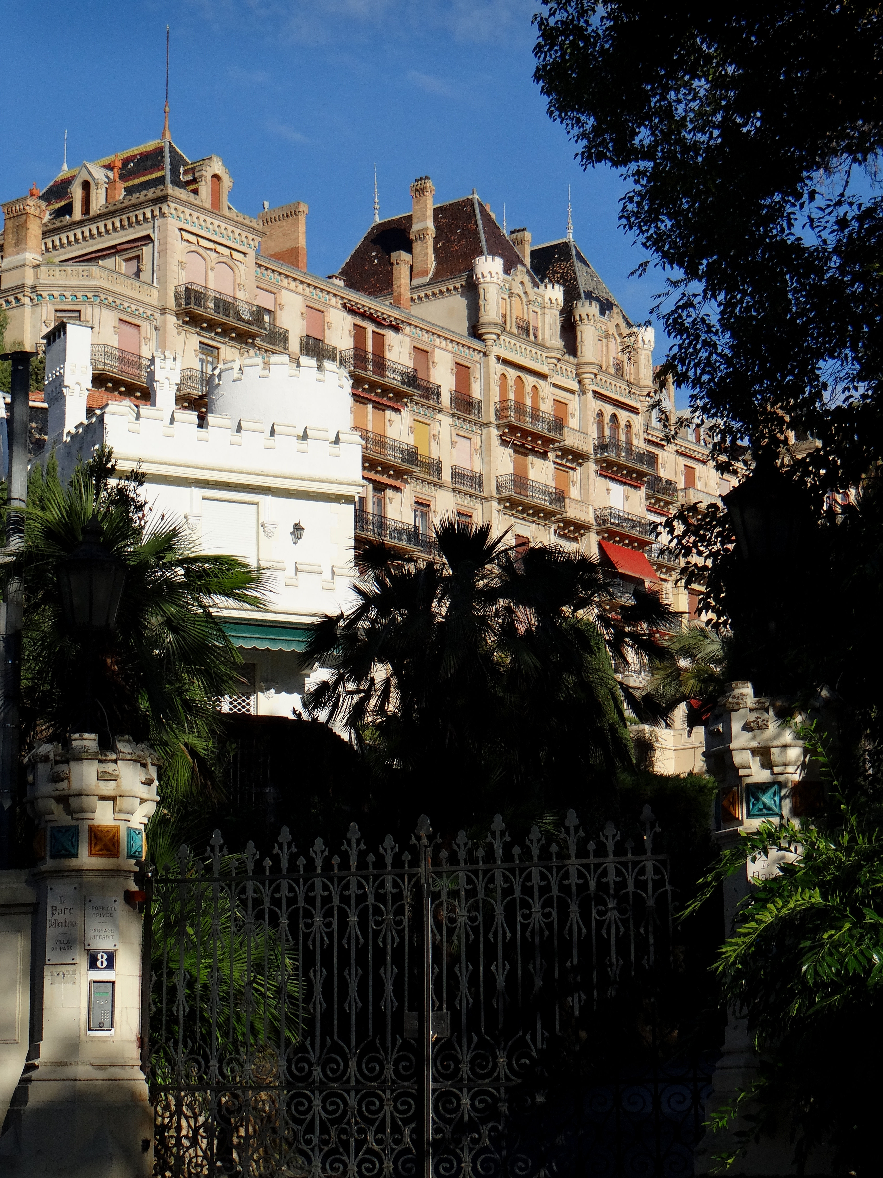 Cannes - Parc Vallombrosa et villa du Parc